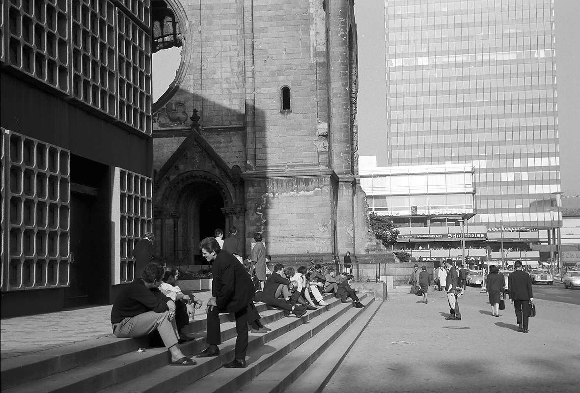 Stufen am Breitscheidplatz in Berlin-Charlottenburg.